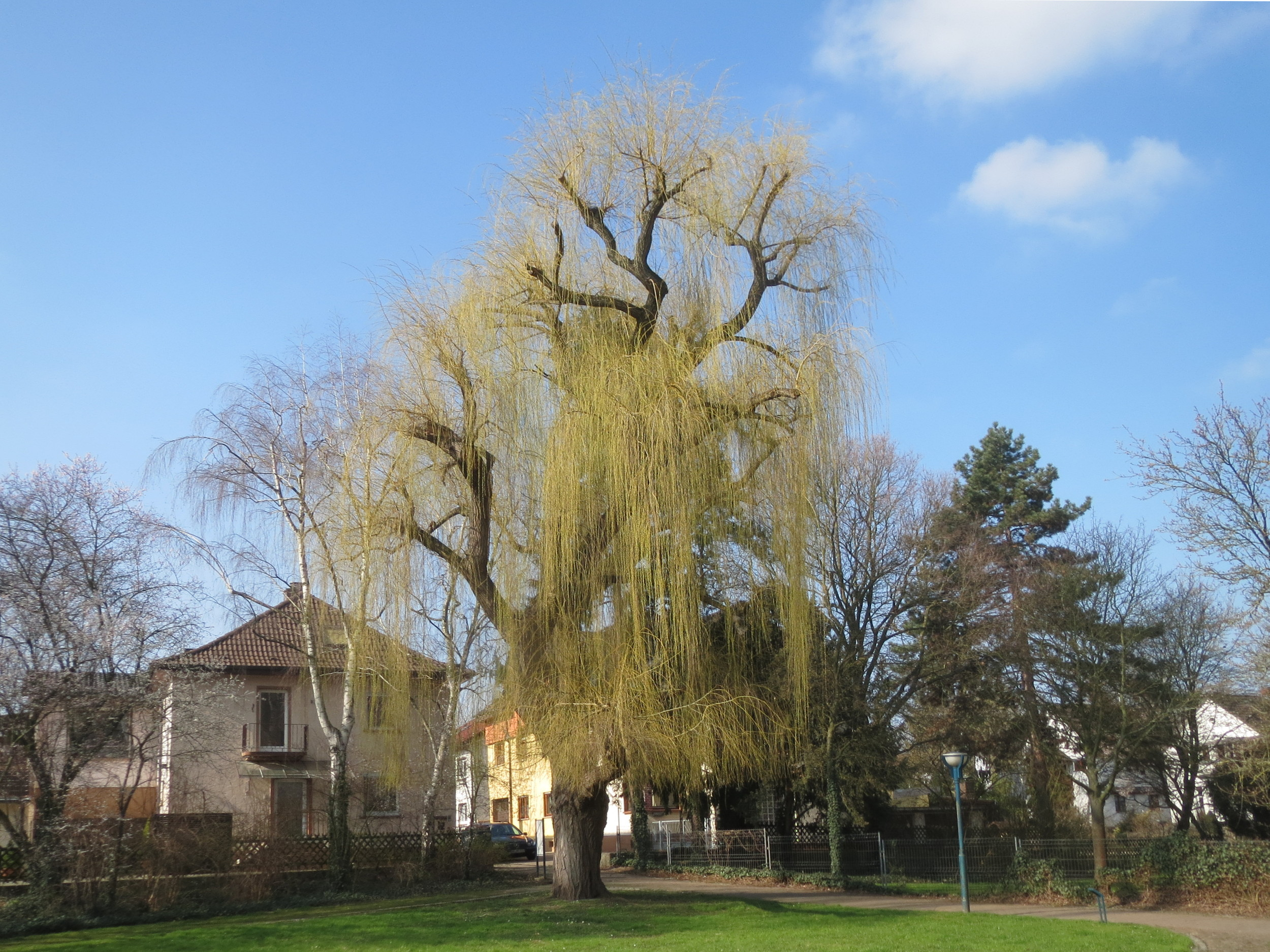 Trauerweide (Salix × sepulcralis) in Hockenheim